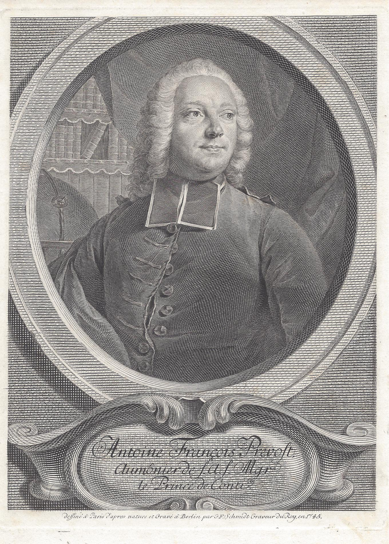 Antoine François Prévost (1697-1763) aumônier de s.a.s. Mgr. le Prince Conti